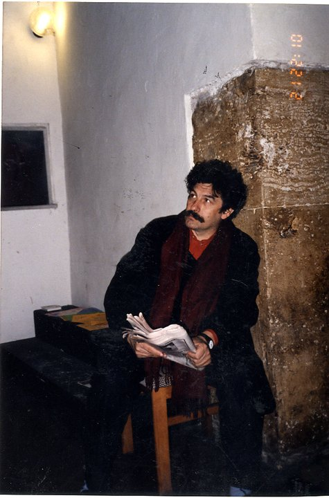 Stelio nelle sue funzioni di direttore del Teatro